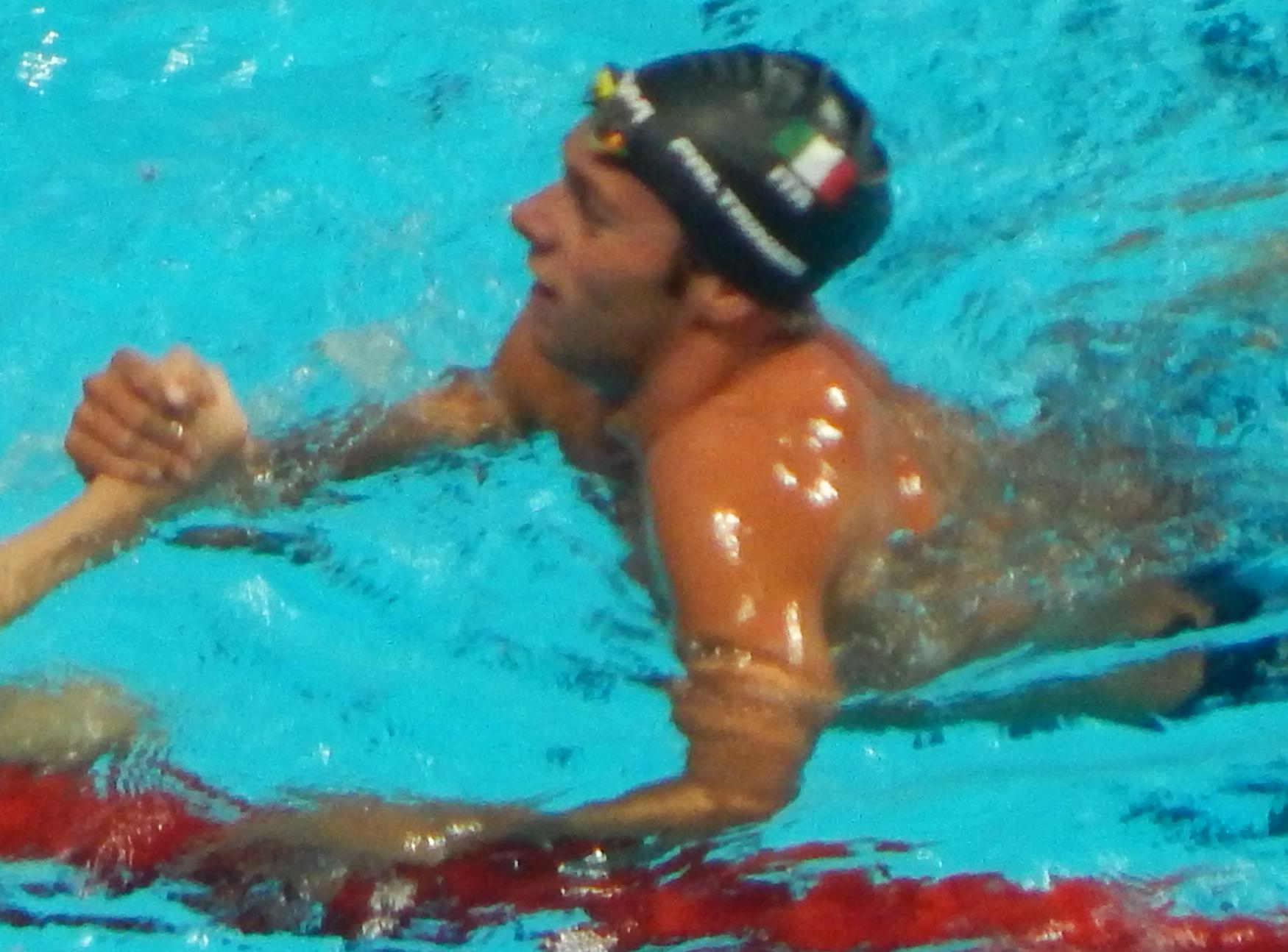 Грегорио Пальтриньери выиграл серебро на 800 метрах